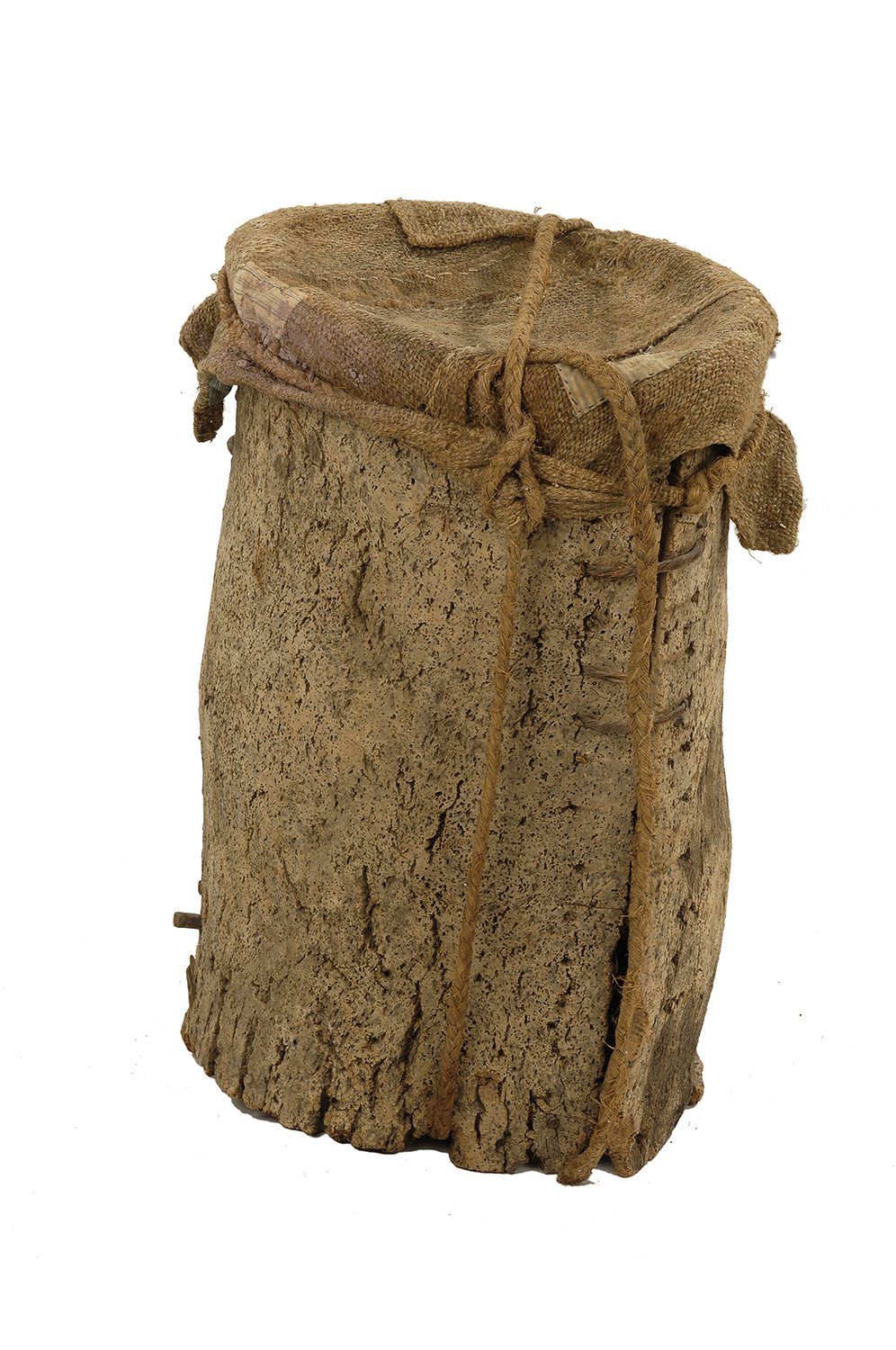 Fotografies dels objectes de l'exposició permanent de la sala "Secà i Muntanya" del Museu Valencià d'Etnologia - Fotografies de Mateo Gamon. Buc d'abelles, Els Serrans, segle XX.